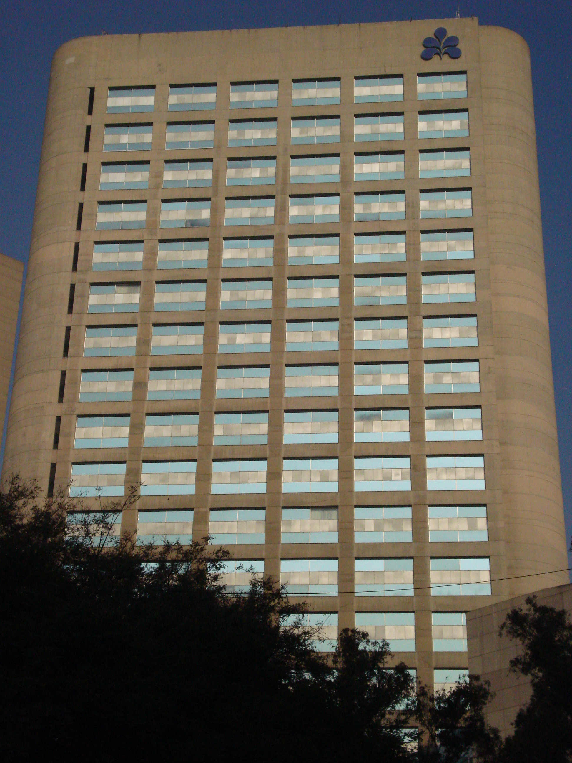 Hotel Nikko México desde la avenida Paseo de la Reforma, en la Ciudad de México.